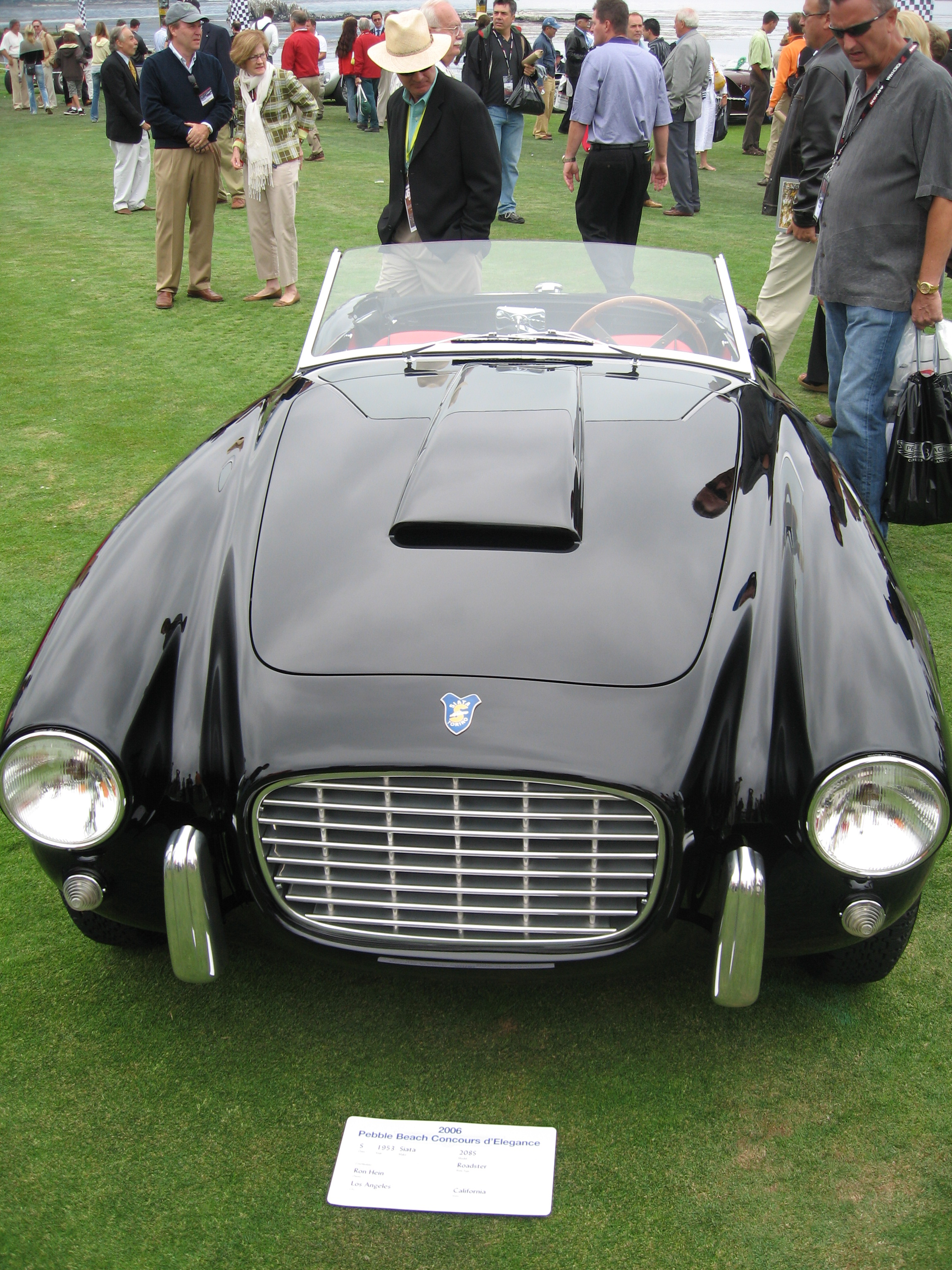 1953 Siata 208S